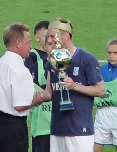 Piotr Reiss w koronie króla strzelców Ekstraklasy za sezon 2006/2007, stadion Lecha, Poznań